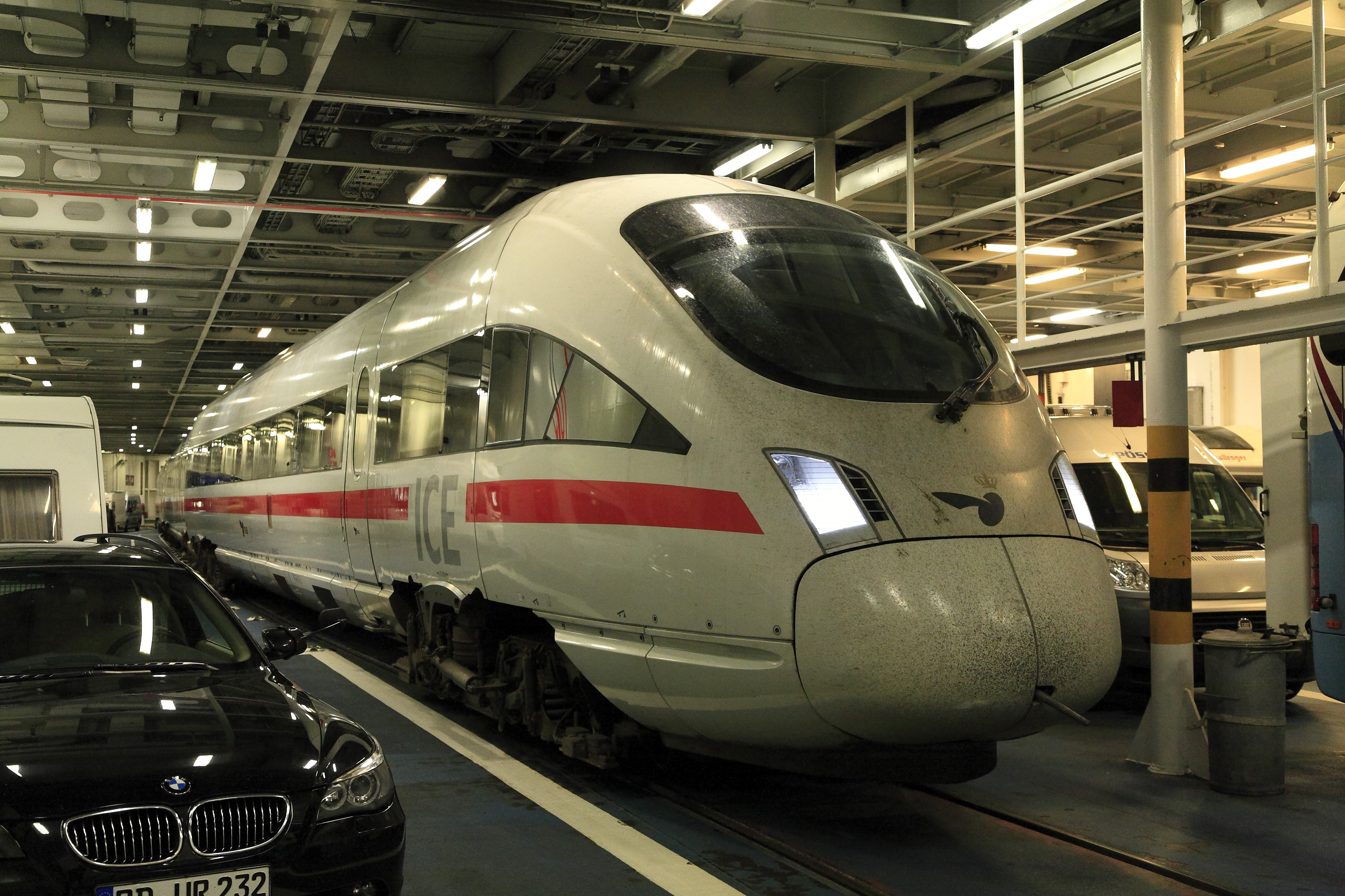 Triebzug der Reihe 605 als ICE 33 Hamburg–Kopenhagen auf dem Hauptdeck der MFS Schleswig-Holstein zwischen Puttgarden und Rødby. Auf den in den Neunzigern gebauten Fährschiffen der Vogelfluglinie gibt es nur noch ein Gleis.